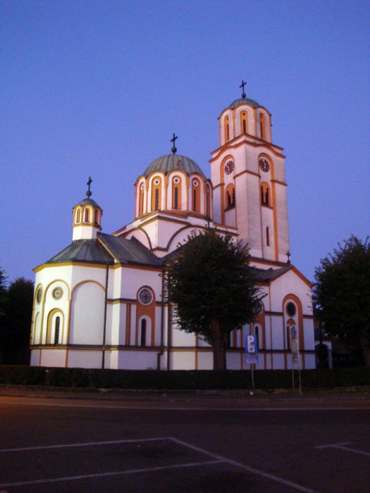 Храм покрова пресвете Богородице (Градишка)